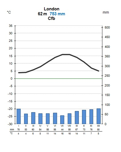 See on Londoni kliimadiagramm